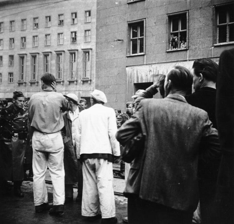 Berlin, 17. Juni 1953